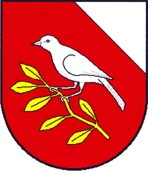 Znak obce Podolí (okres Brno-venkov)